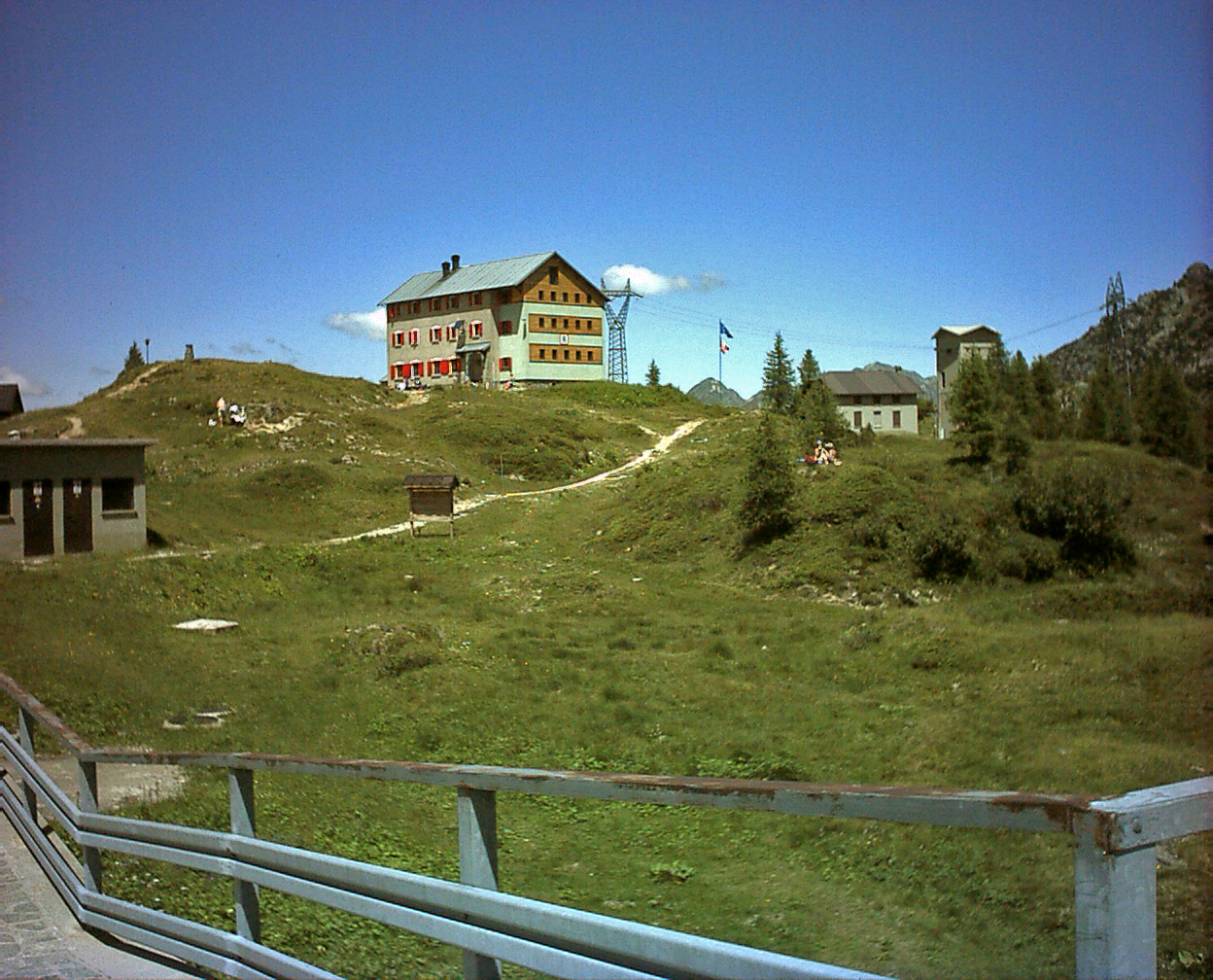 Rifugio Laghi Gemelli, Italy photo by Cruccone